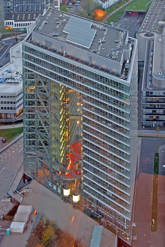 Stadttor Düsseldorf, aufgenommen vom Rheinturm